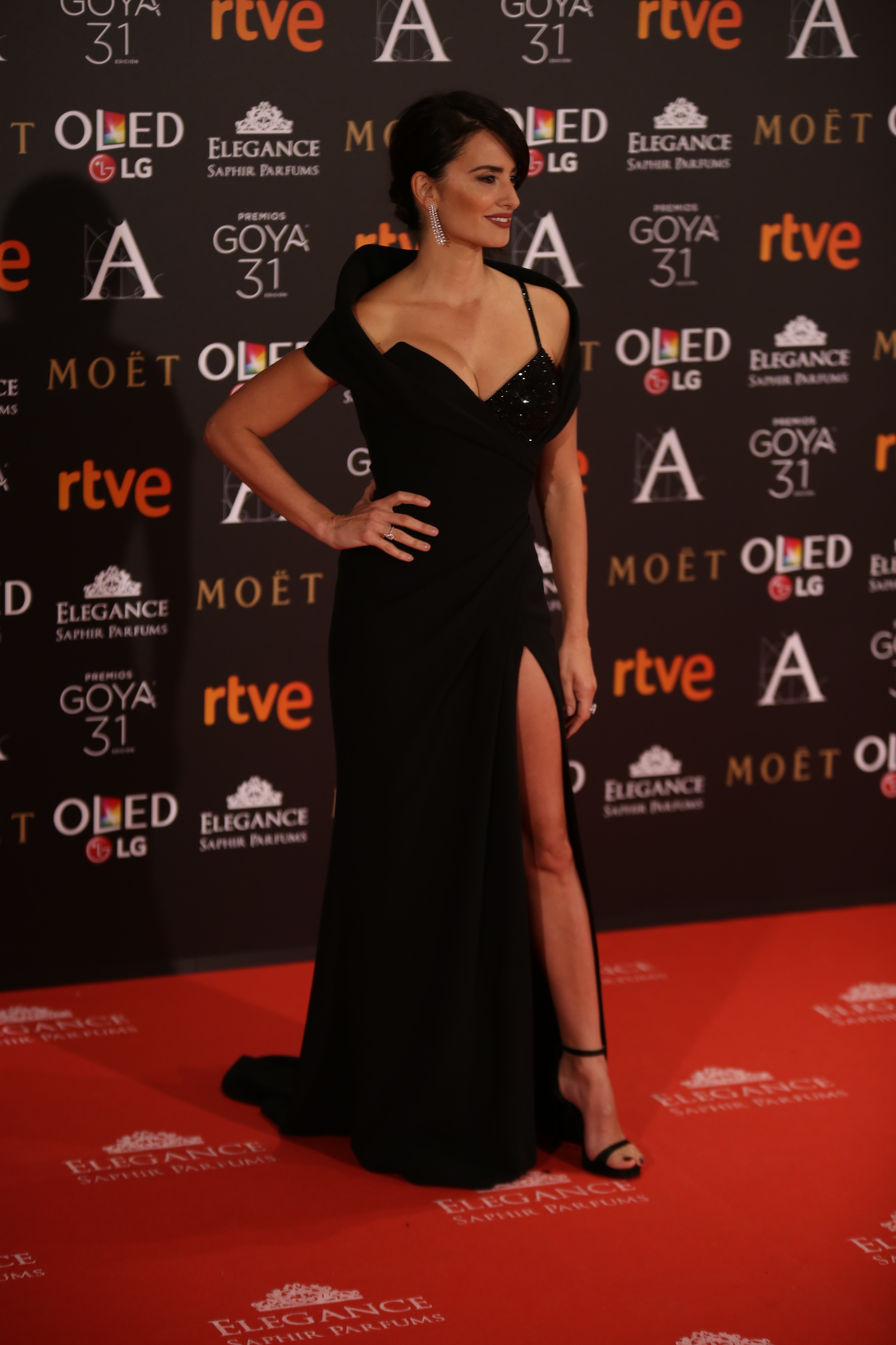 Premios Goya 2017